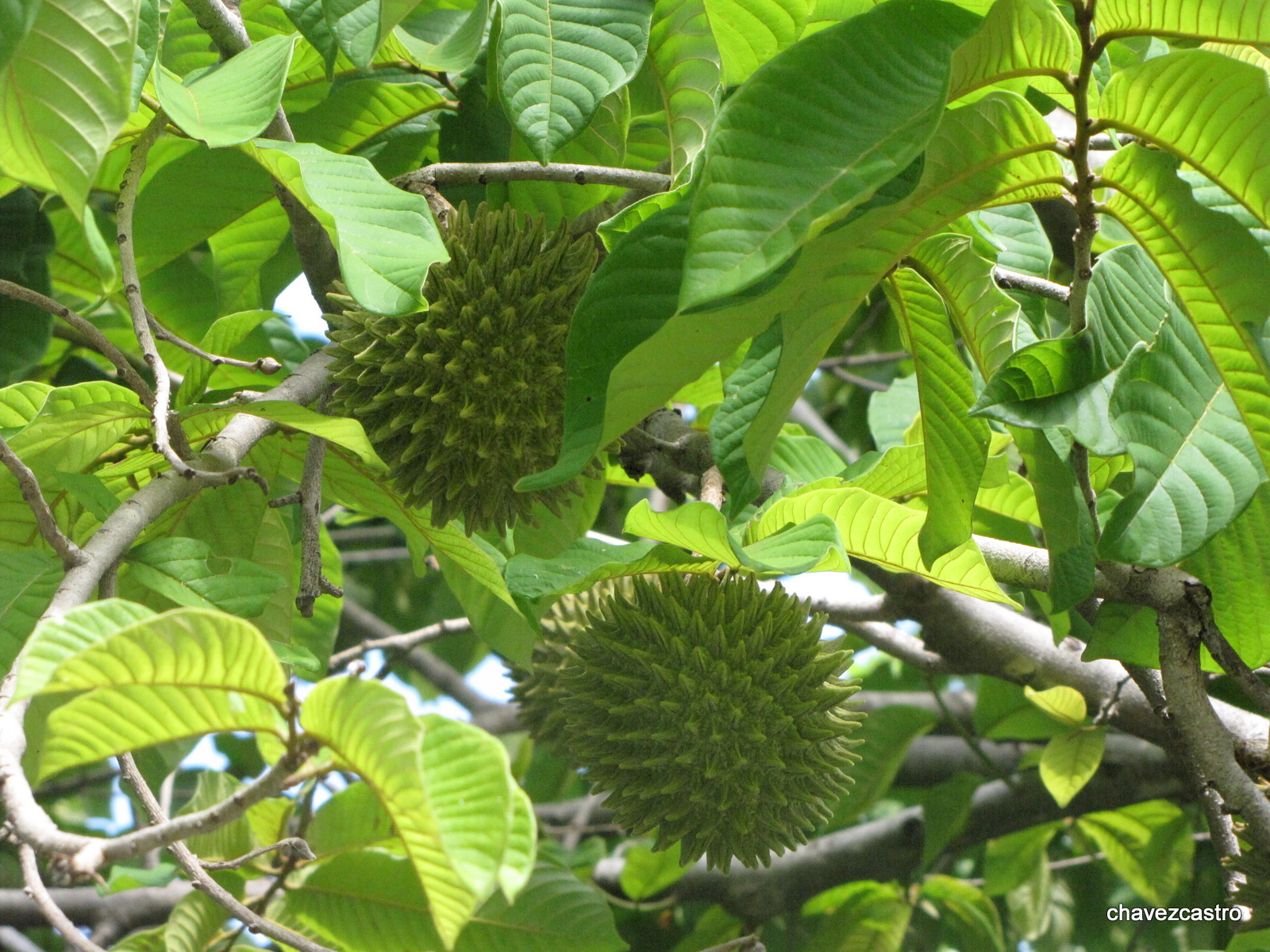 Arbol de cincuyo y sus frutos la Cincuya.